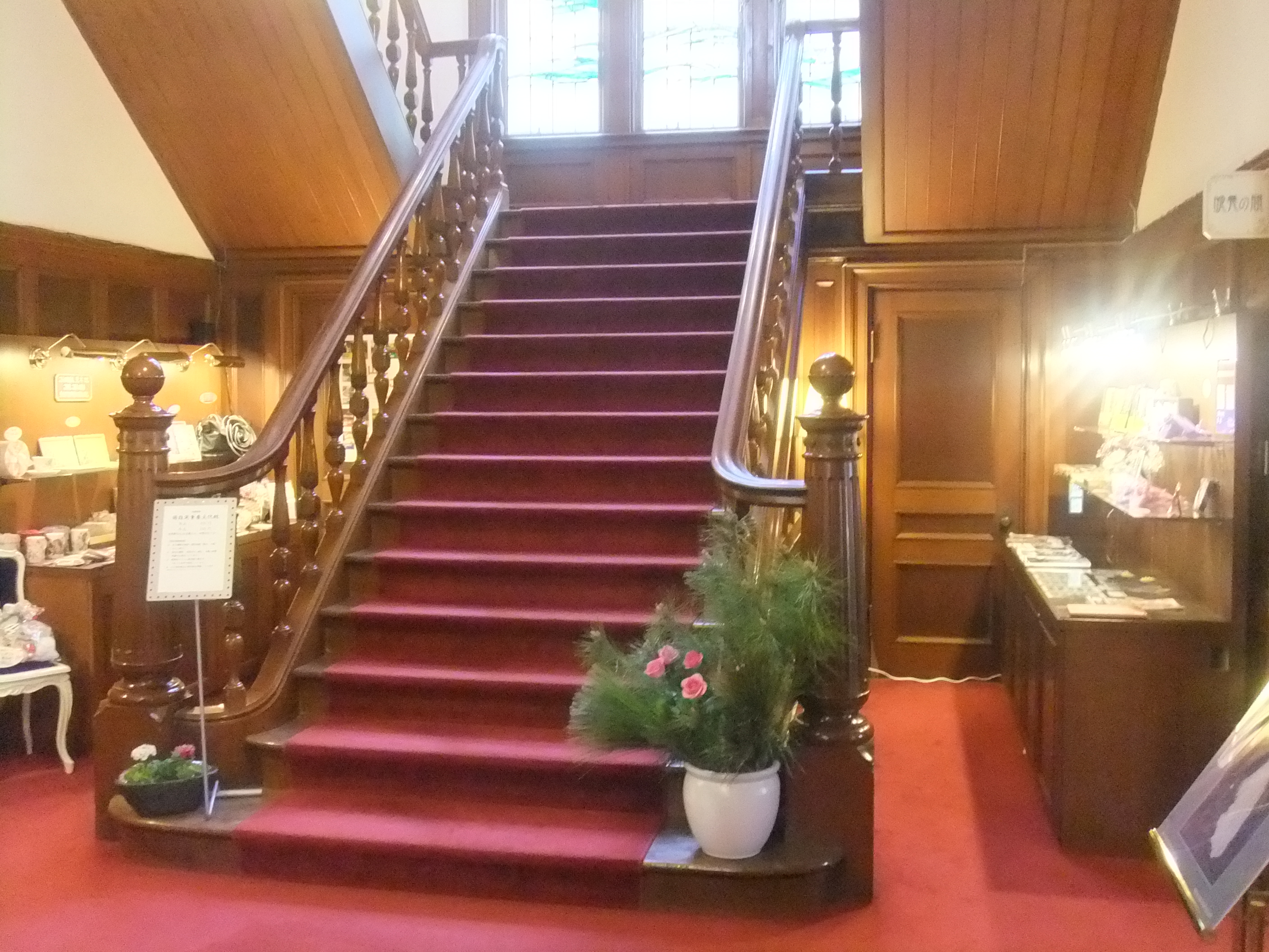 萬翠荘 室内の様子3